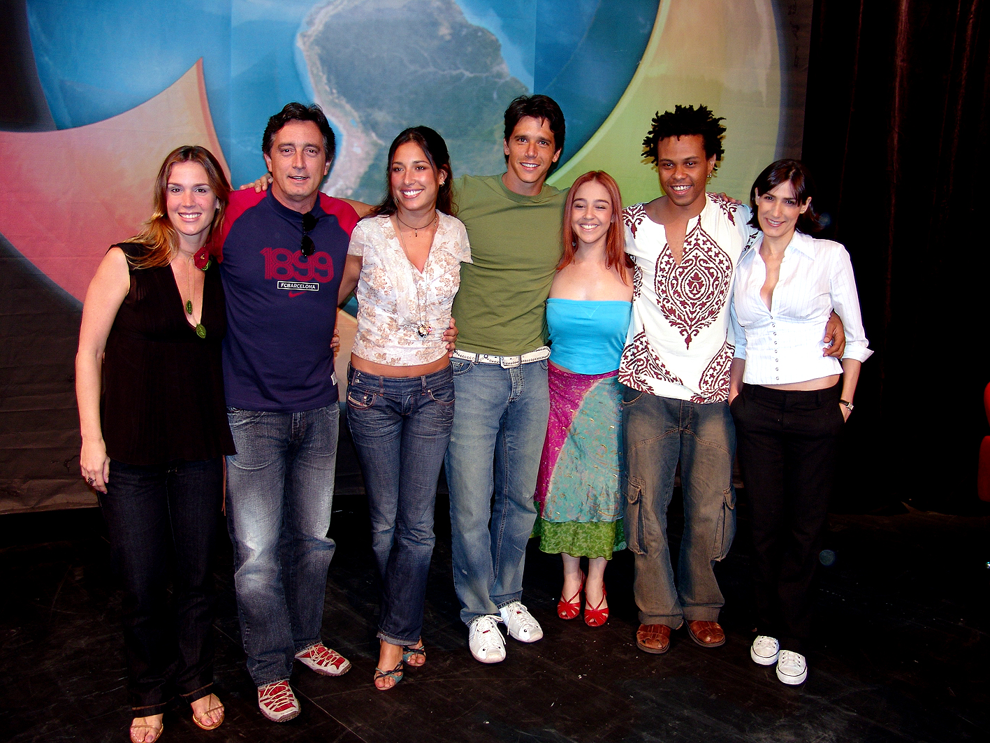 Vanessa Lóes, Eduardo Galvão, Giselle Itié Ramos, Márcio Garcia, Débora Lamm, Gustavo Mello e Virgínia CavendishAll